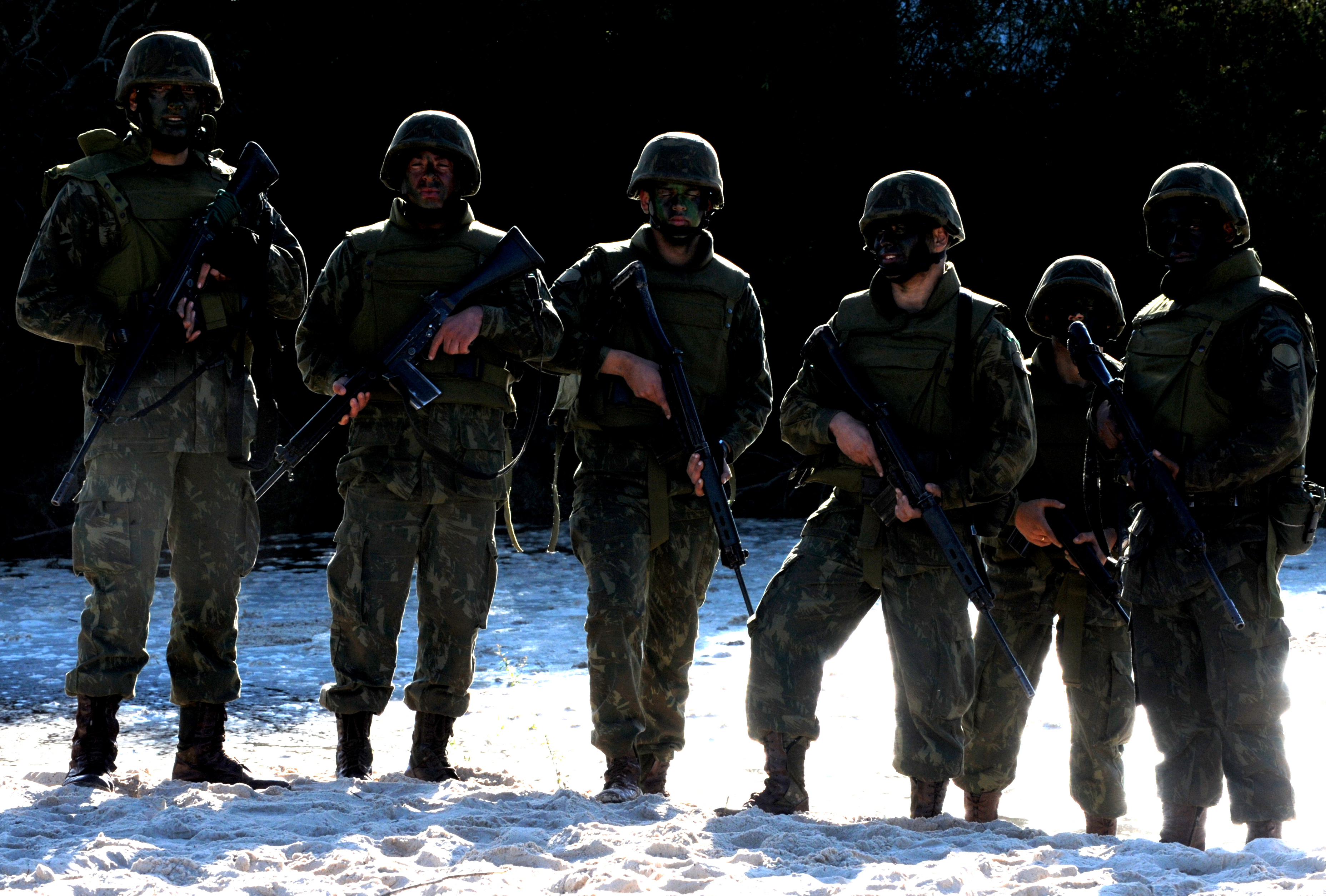 Fotos: Jorge Cardoso